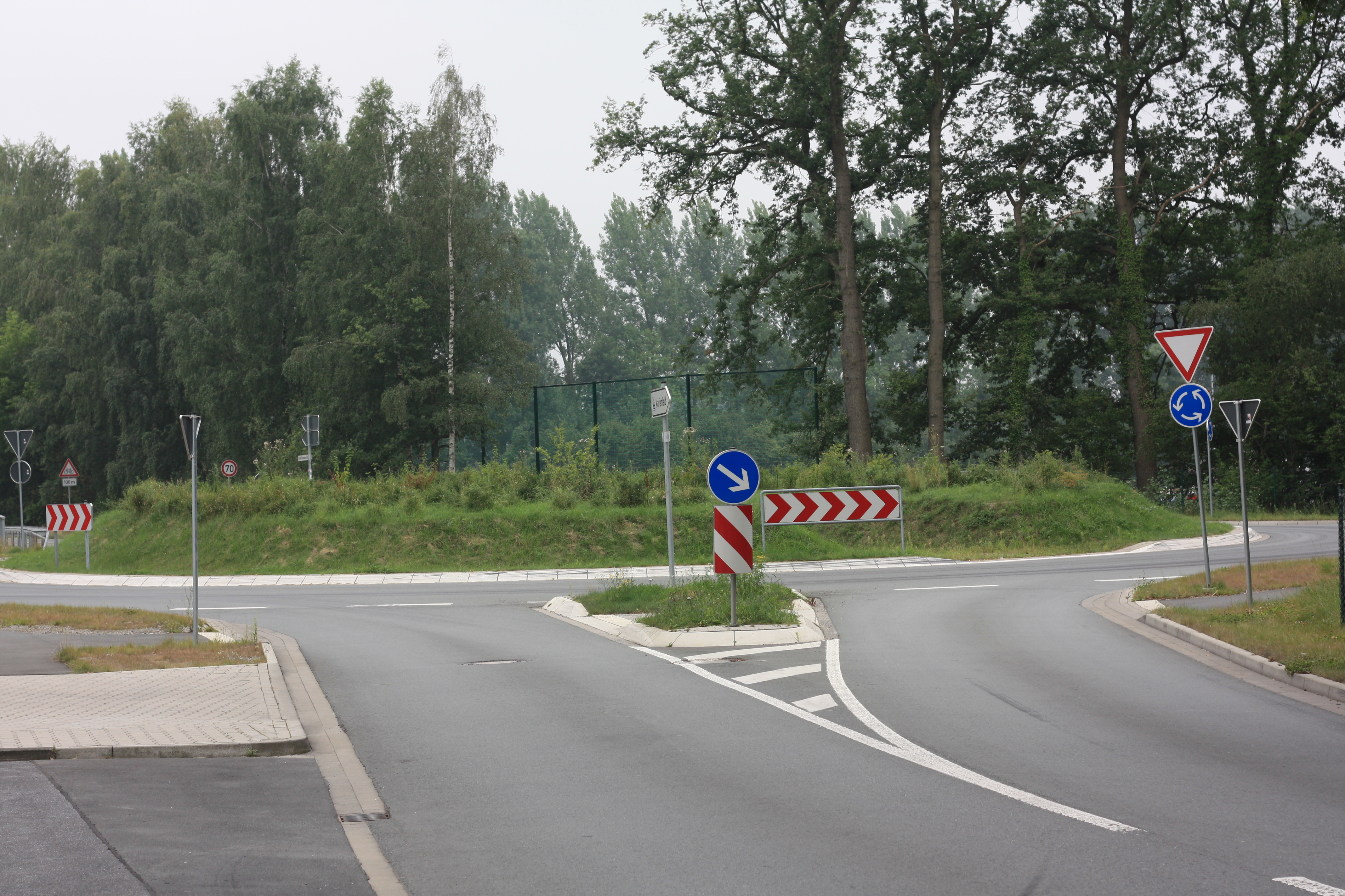 Kreisverkehr Anton-Bessmann-Ring / Bielefelder Straße